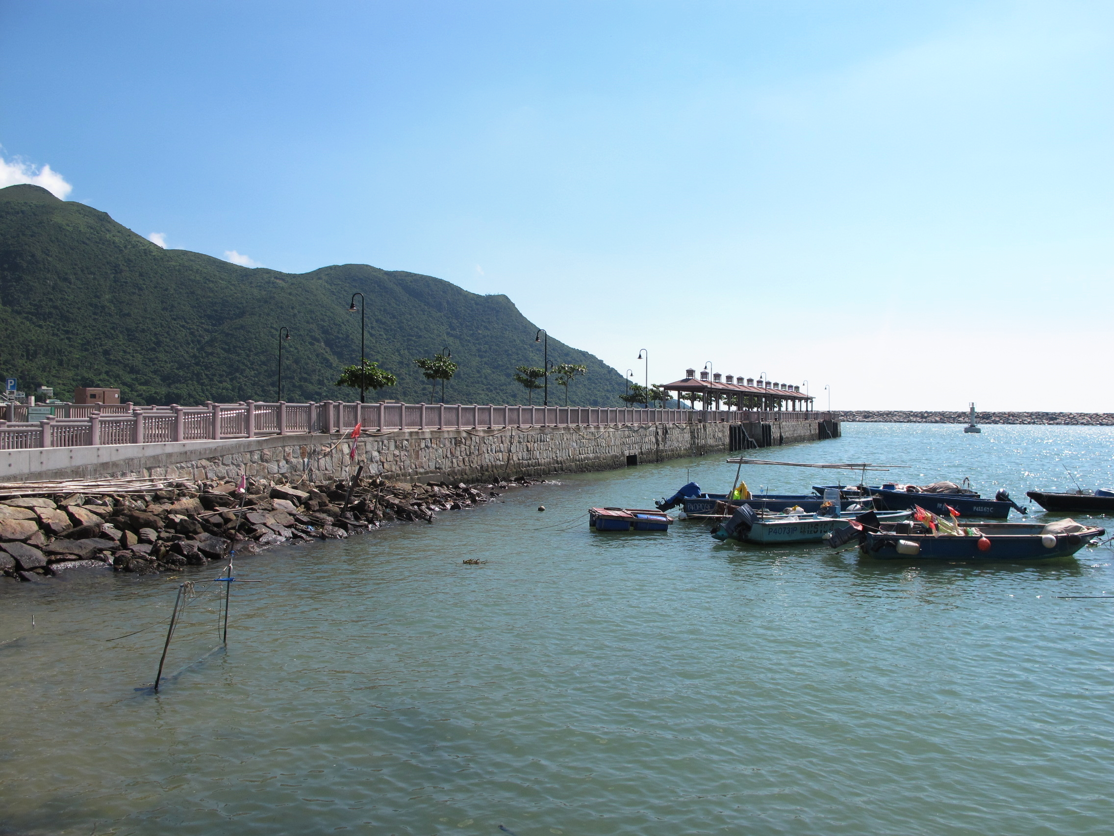 Tai O New Pier